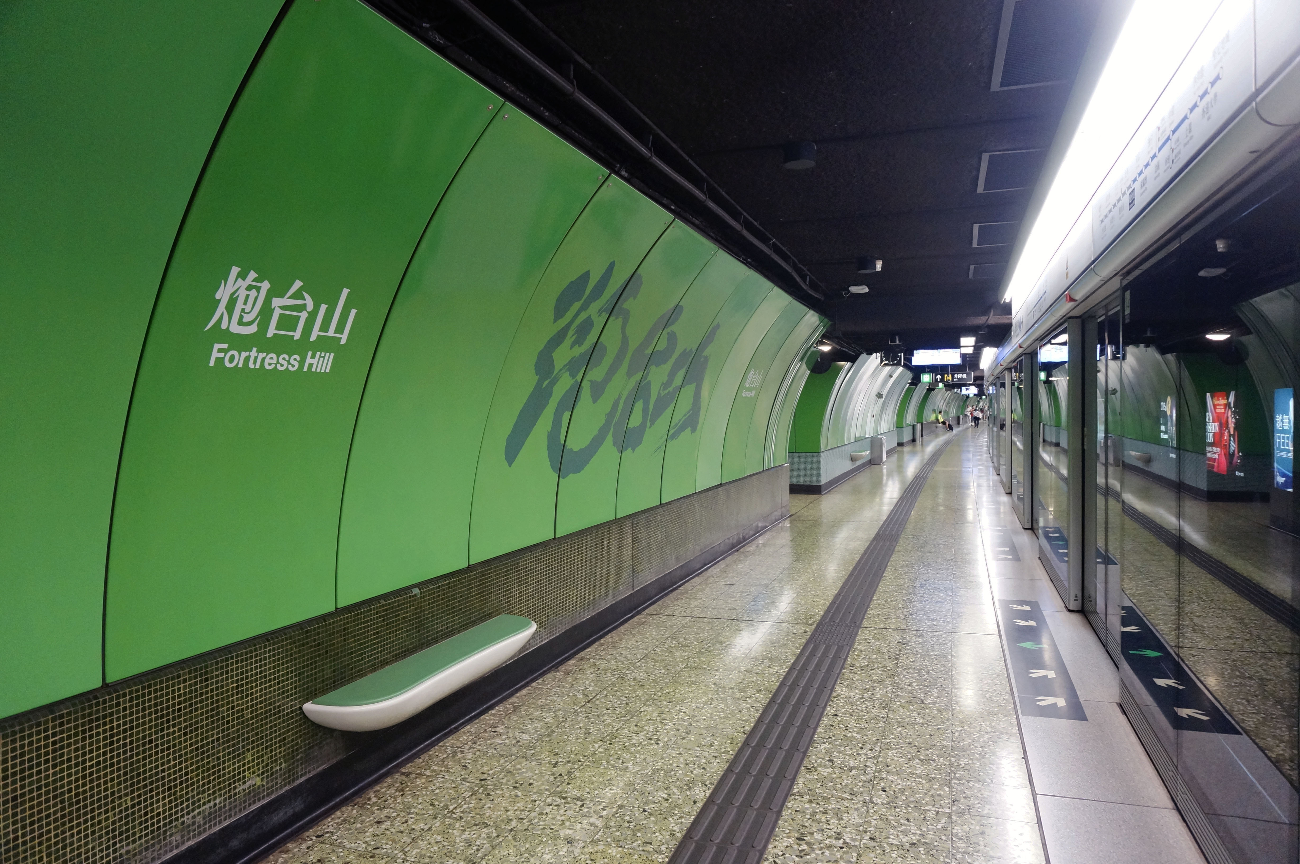 港鐵炮台山站月台